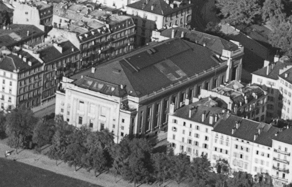 Bâtiment électoral (inauguré en 1915, incendié en 1964) à Genève. Une grande Croix-Rouge est peinte sur le toit car le bâtiment est le siège de l'Agence centrale des prisonniers de guerre de 1939 à 1945.